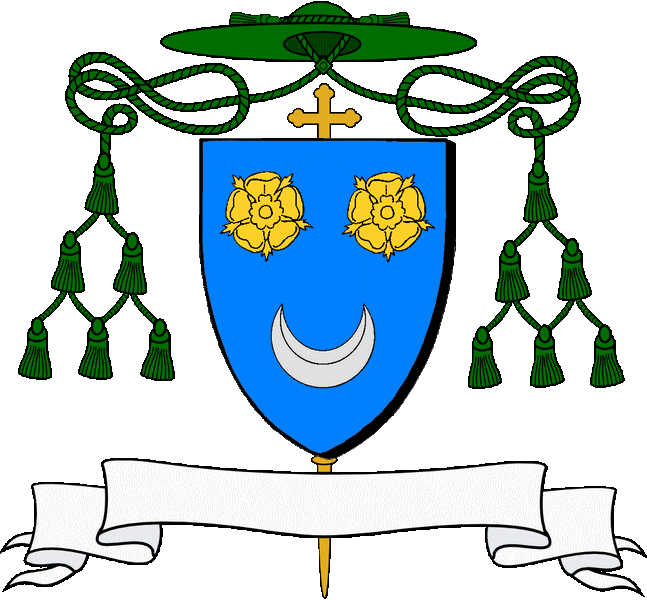 En glazur e ziv rozenn en aour ouzh kab hag ur greskenn en arc'hant ouzh beg